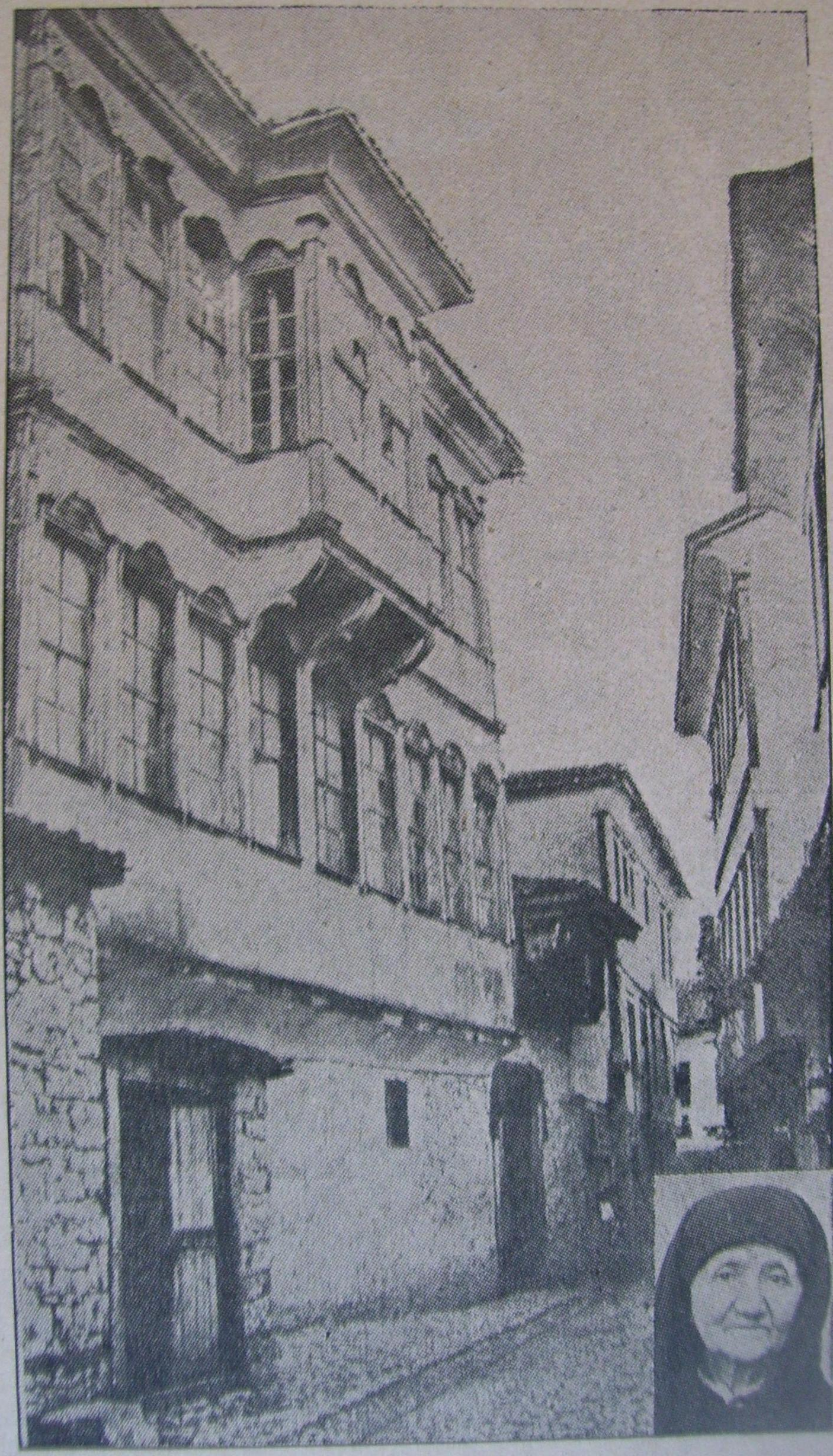 Къщата на Чакъровци в Струга и Агния Чакърова.